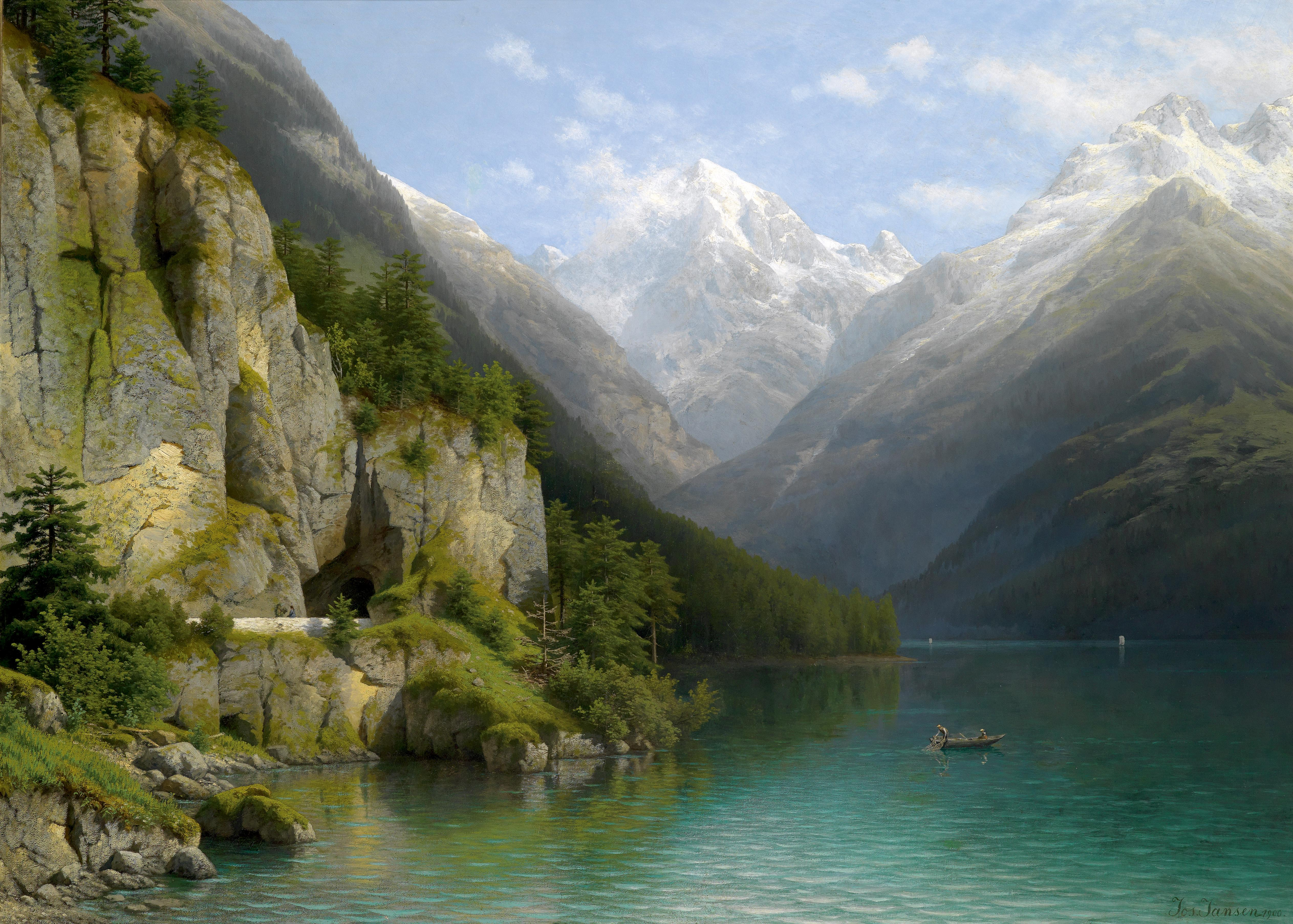 Blick auf den Vierwaldstättersee, signiert, datiert Jos. Jansen 1900, Öl auf Leinwand, 94 x 130,5 cm